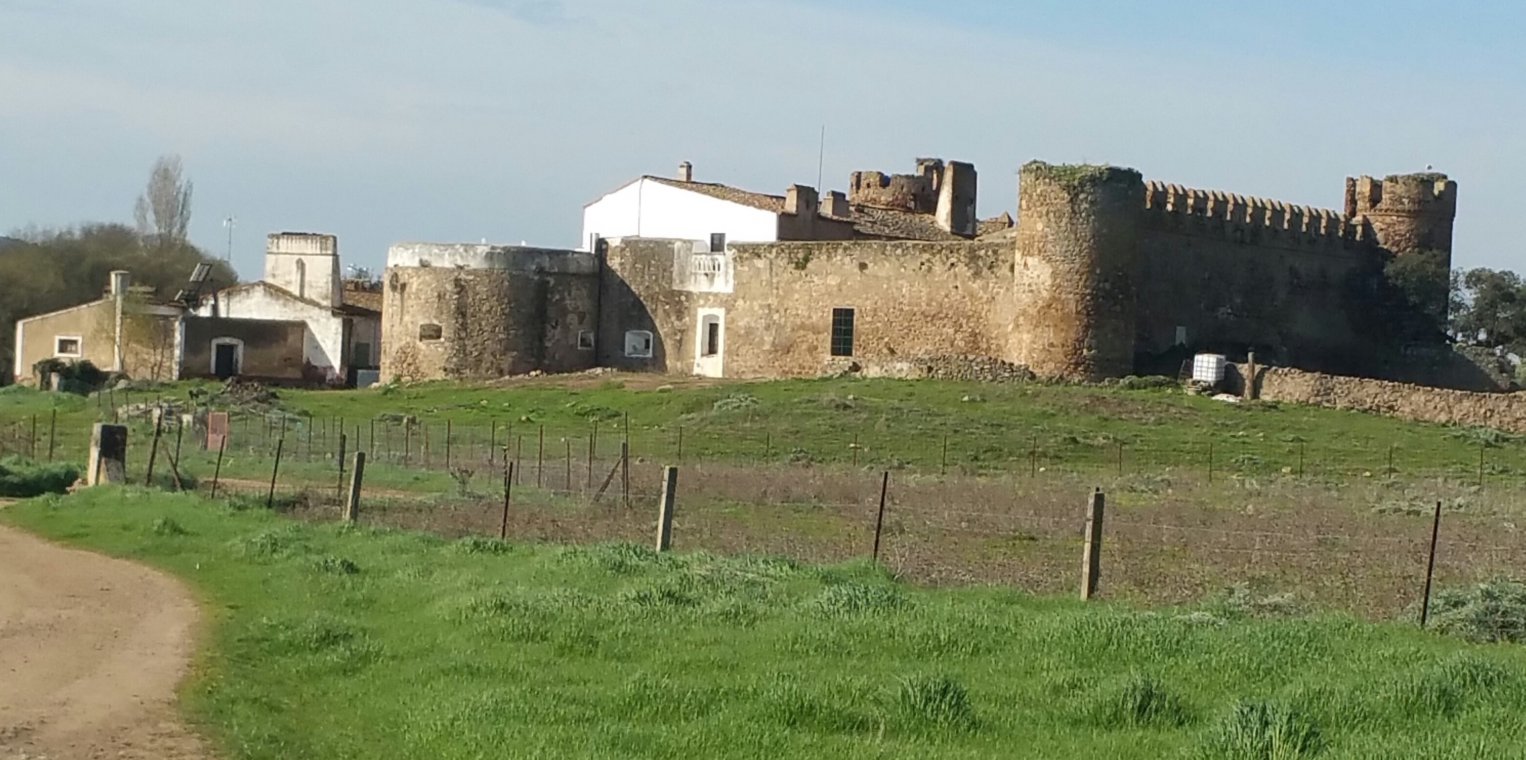 Exteriores del Castillo de los Arcos. Almendral, Badajoz.